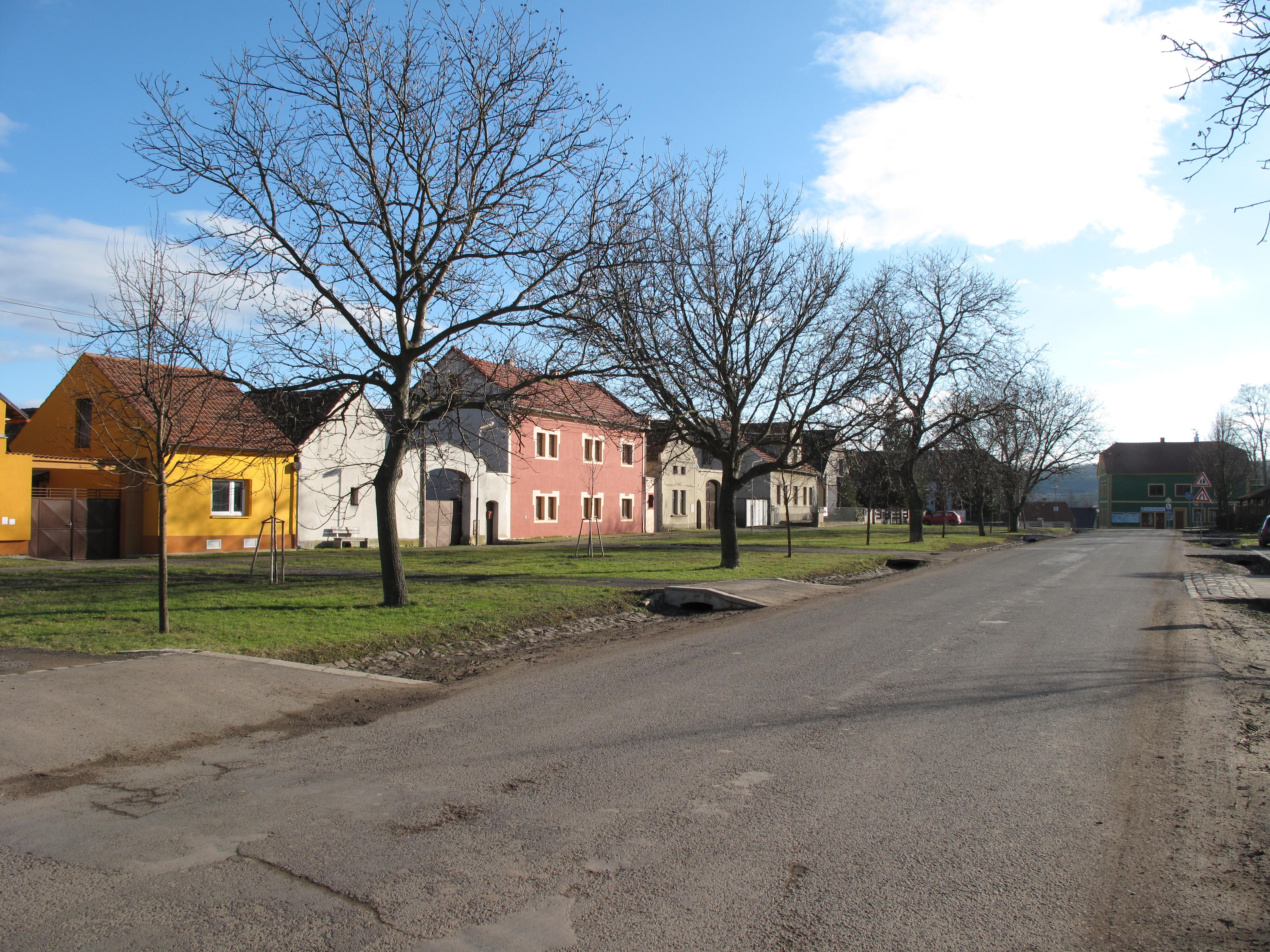 Náves v Radovesicích. Okres Litoměřice, Česká republika.